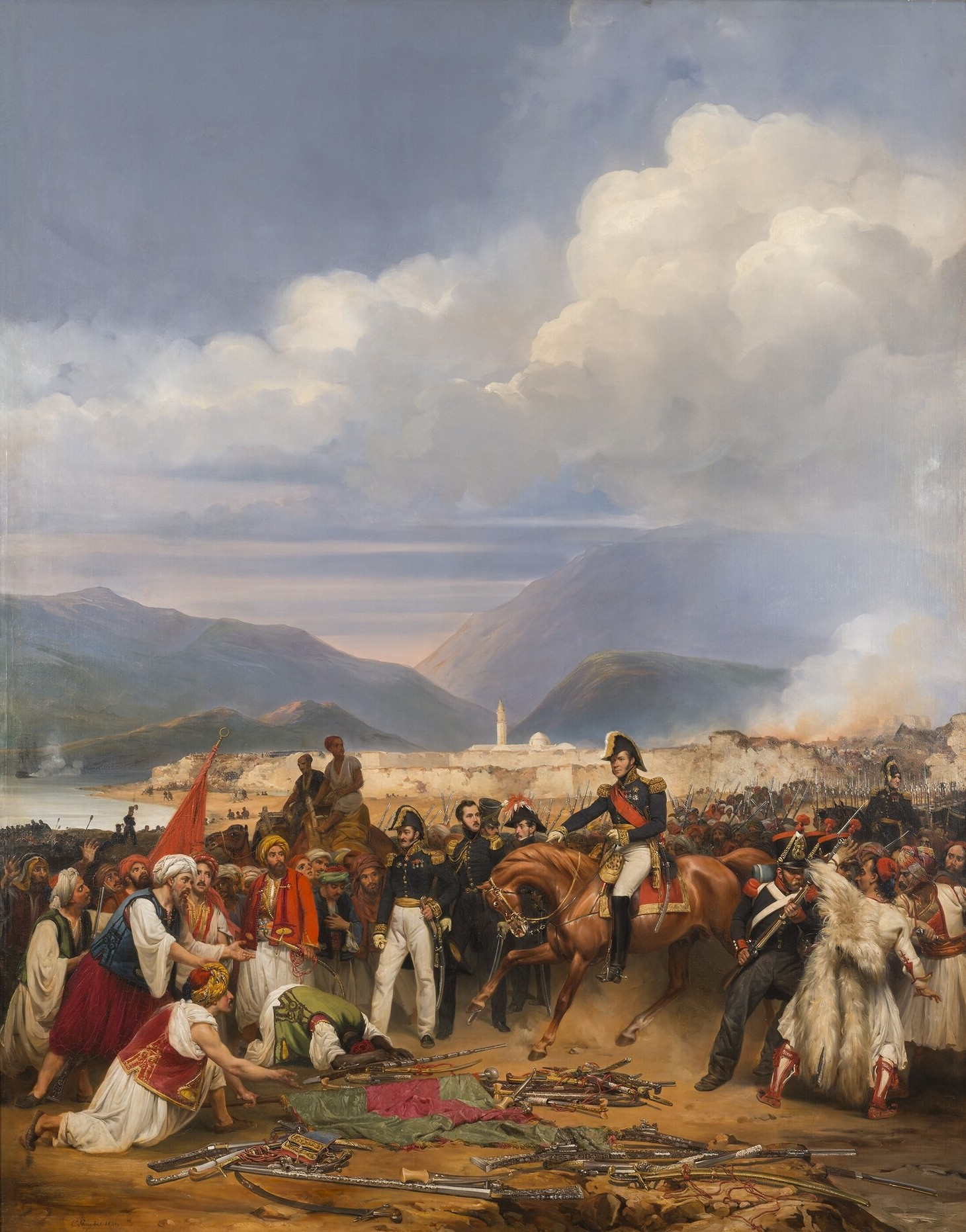 Le Général Maison reçoit la reddition de Château de Morée. 1828. Expédition française en Morée (1828-1833). Dimensions : 247,4 x 190 cm. Matière et technique : huile sur toile.